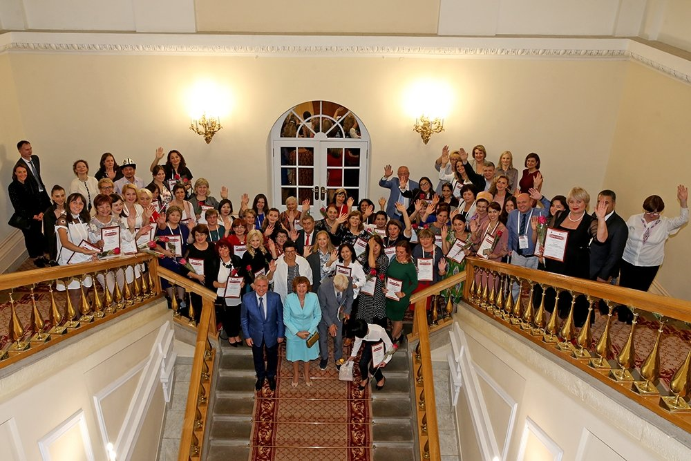 В московской мэрии наградили лауреатов Международного Пушкинского конкурса для учителей, 2019г